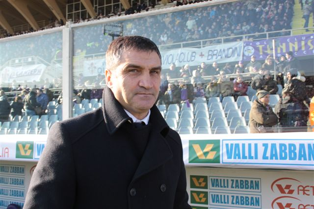 Luigi De Canio (Matera, 26 settembre 1957) è un ex calciatore e allenatore di calcio italiano, attuale tecnico del Lecce.